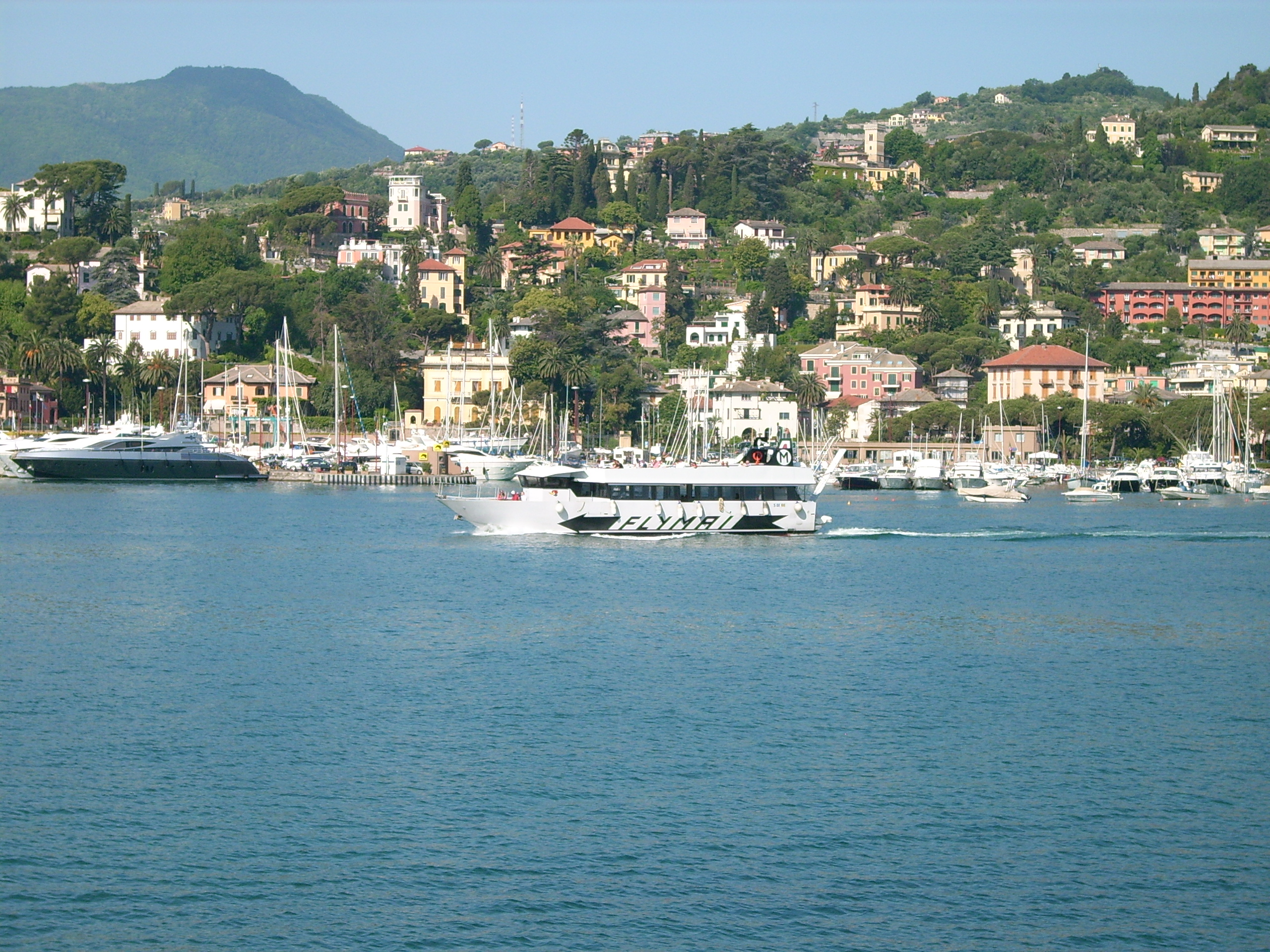 Battello presso il Golfo di Rapallo, Liguria, Italia